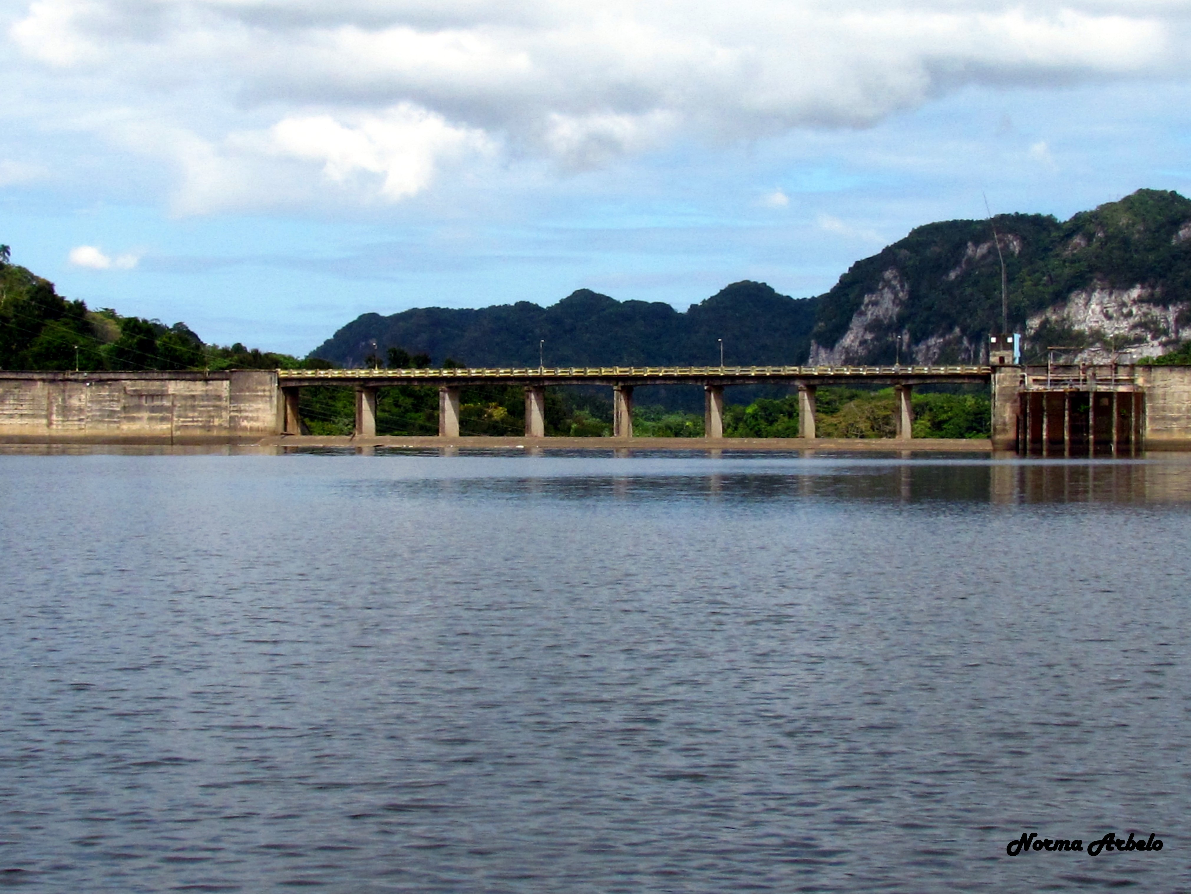 Represa del Lago Dos Bocas en Utuado, Puerto Rico.